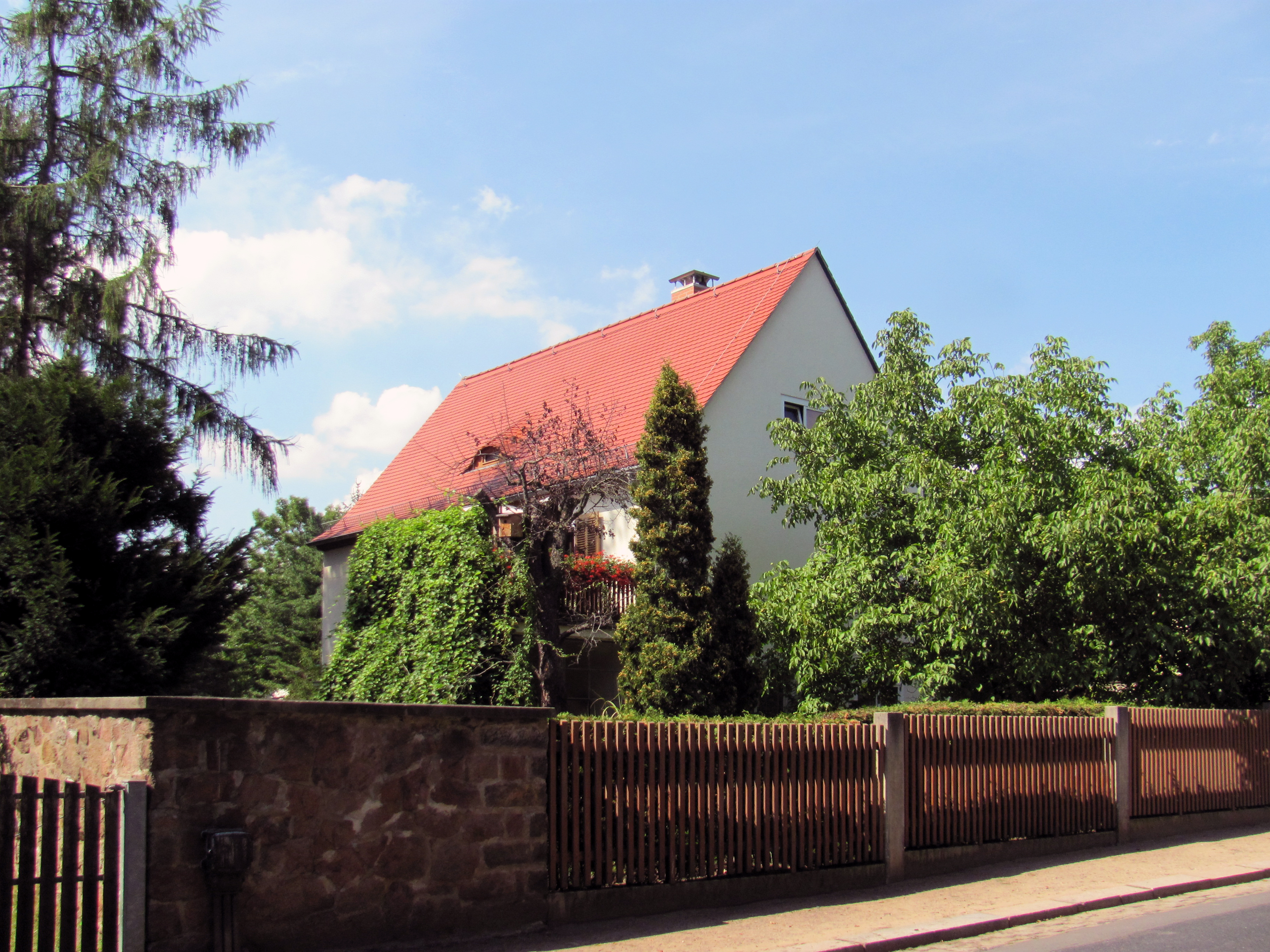 Radebeul-Serkowitz, Wohnhaus Friedrich Rötschke